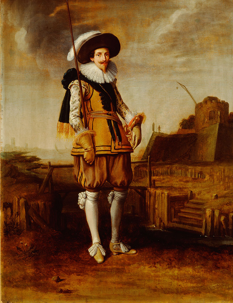 schilderij; burgemeester van Amsterdam; portret; mansportret; portret Amsterdam; Backer, Willem